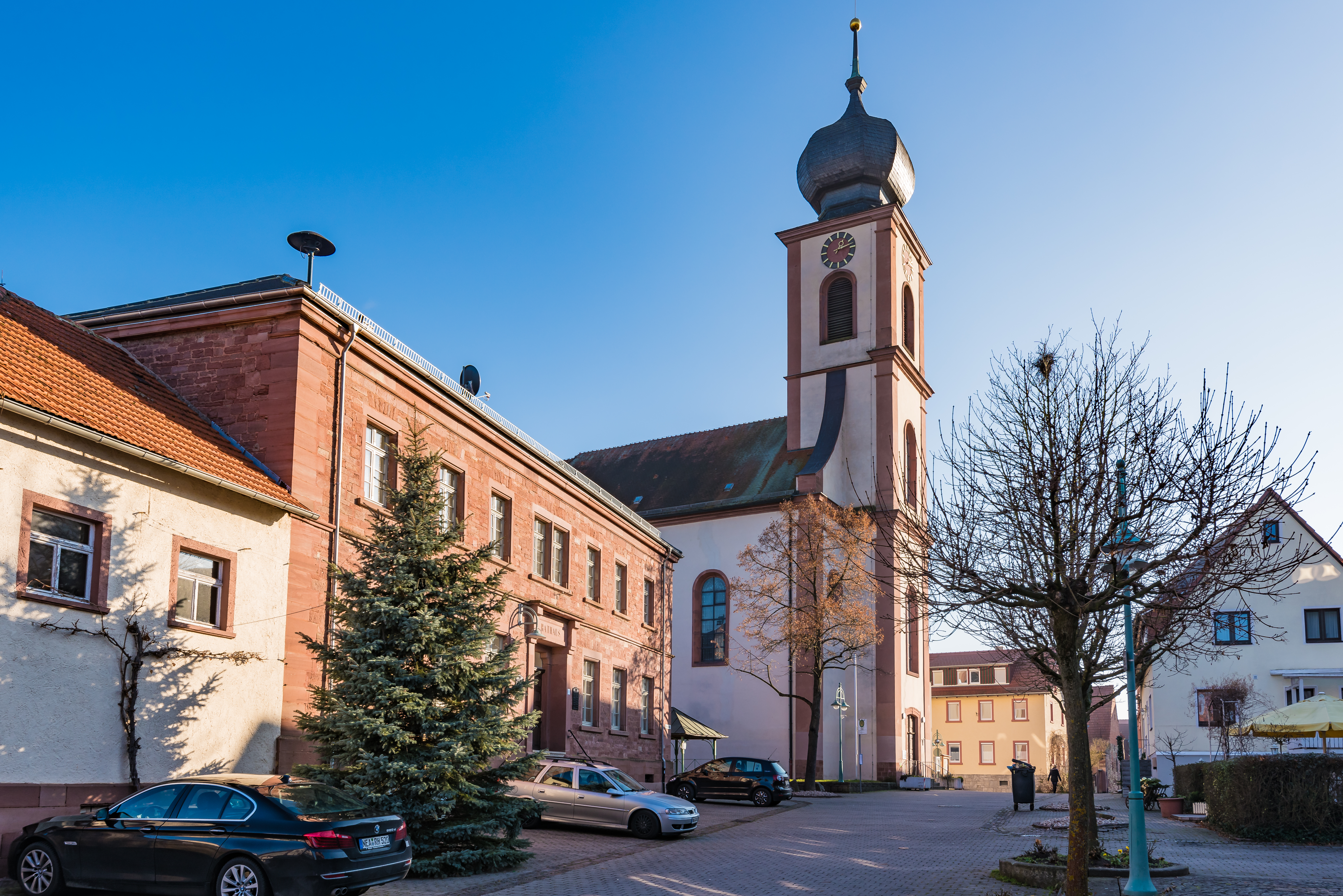 Seitenansicht.